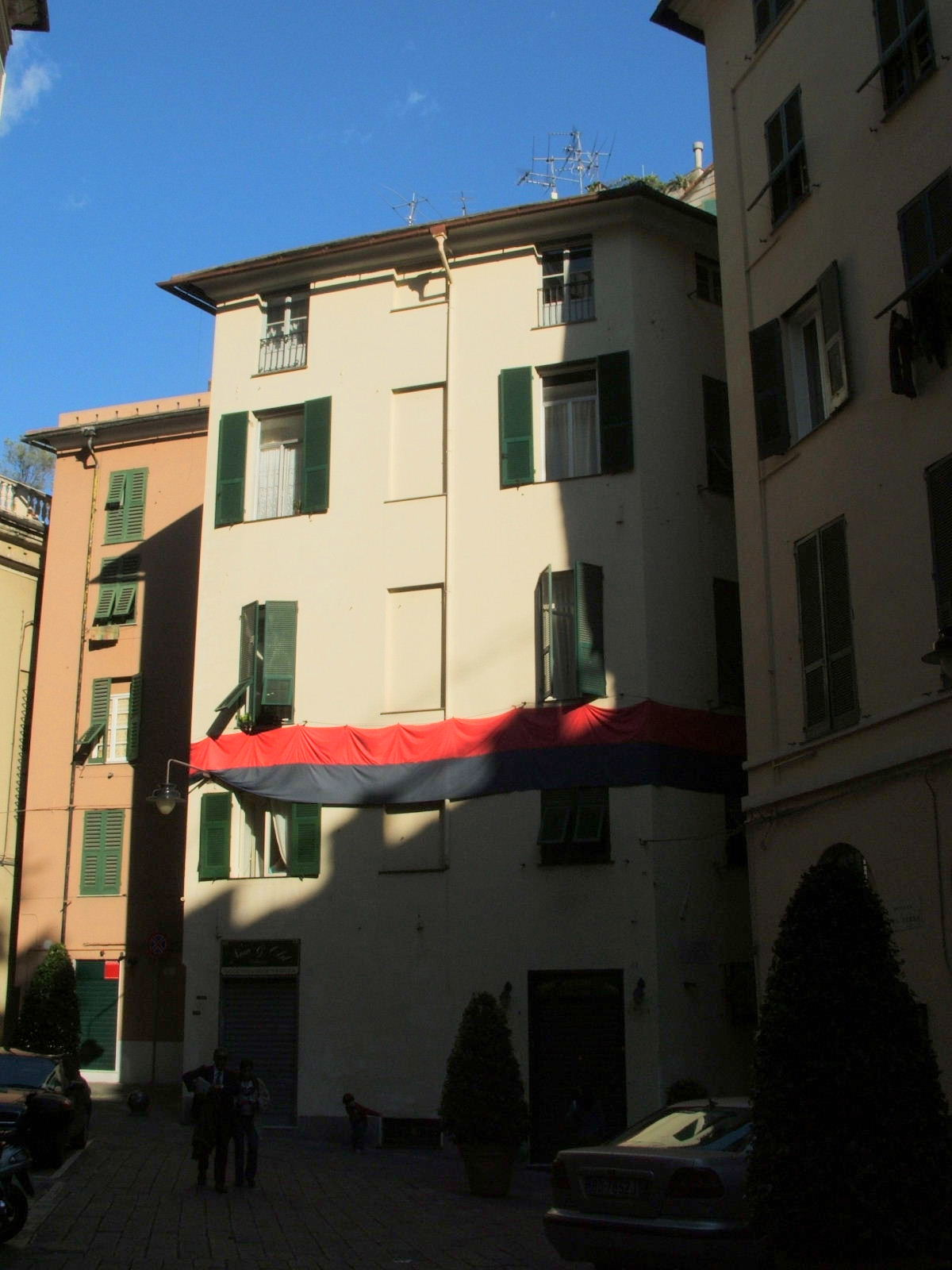 Genova Palazzo del centro storico